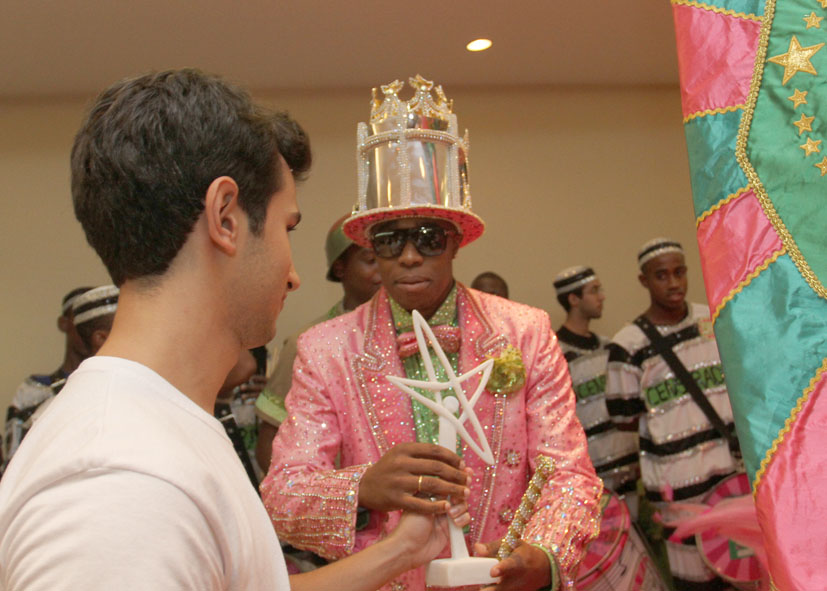 Fotógrafo Henrique Matos